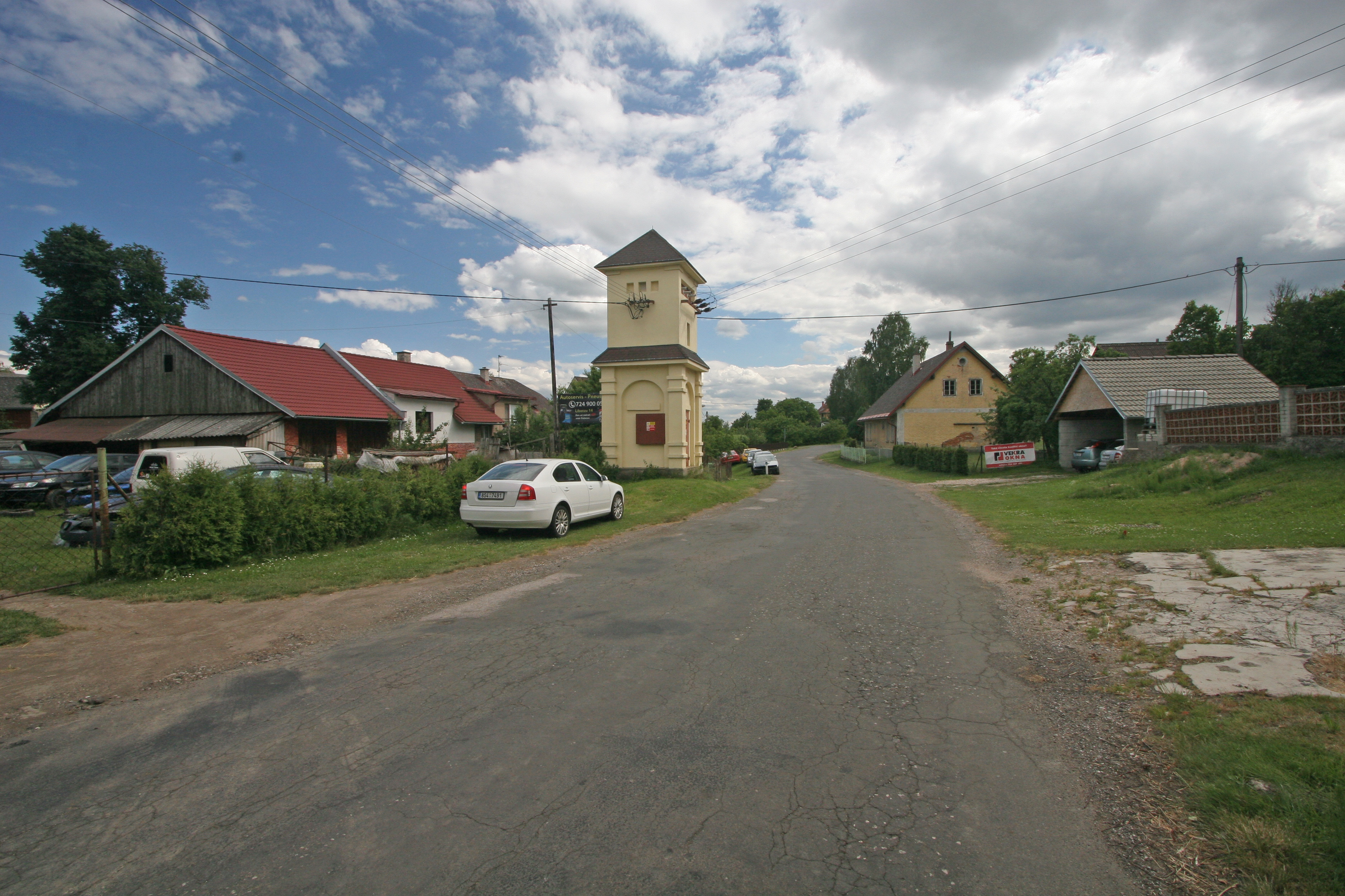 Libotov transformátor u čp. 14